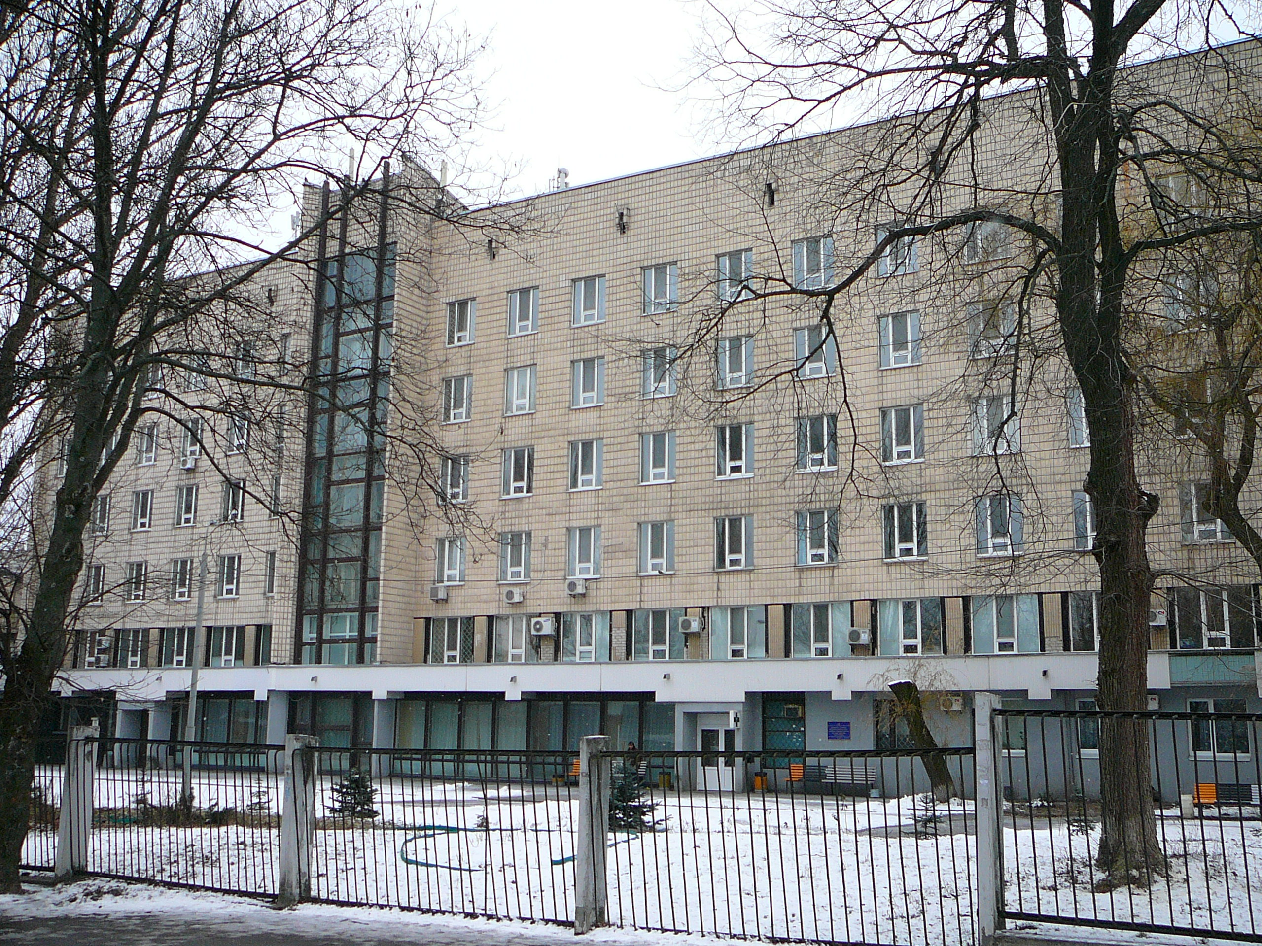 Національний інститут серцево-судинно хірургії ім. М.М. Амосова НАМН України, вул. М. Амосова №6